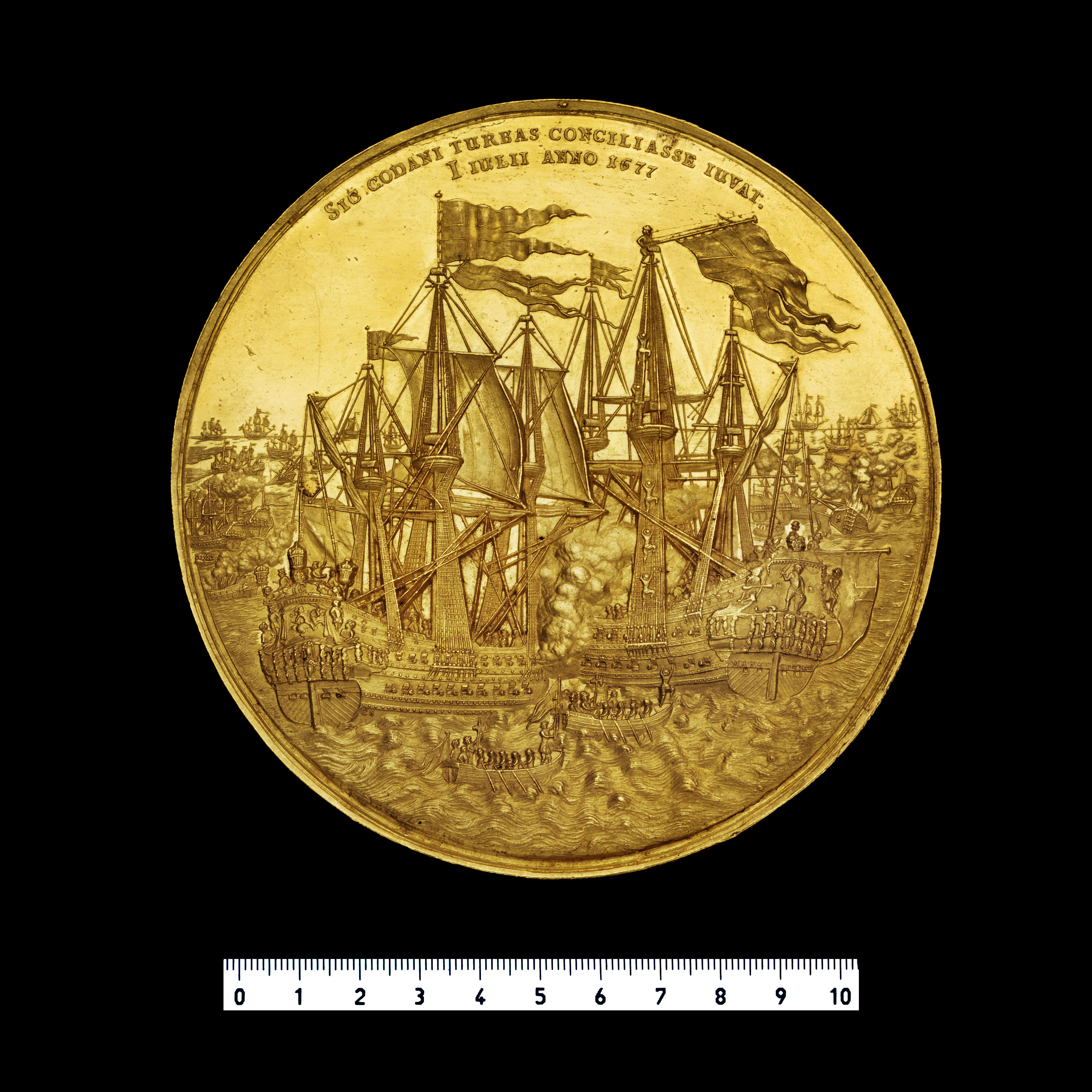 Medalje for Slaget ved Køge Bugt 1677, bagside Beskrivelse Medalje til minde om sejren i Slaget i Køge Bugt 1677, Galster 124, bagside. Medaljen er lavet af Christopher Schneider, mester for mange af Christian Vs medaljer i anledning af sejrene i Den Skånske Krig.